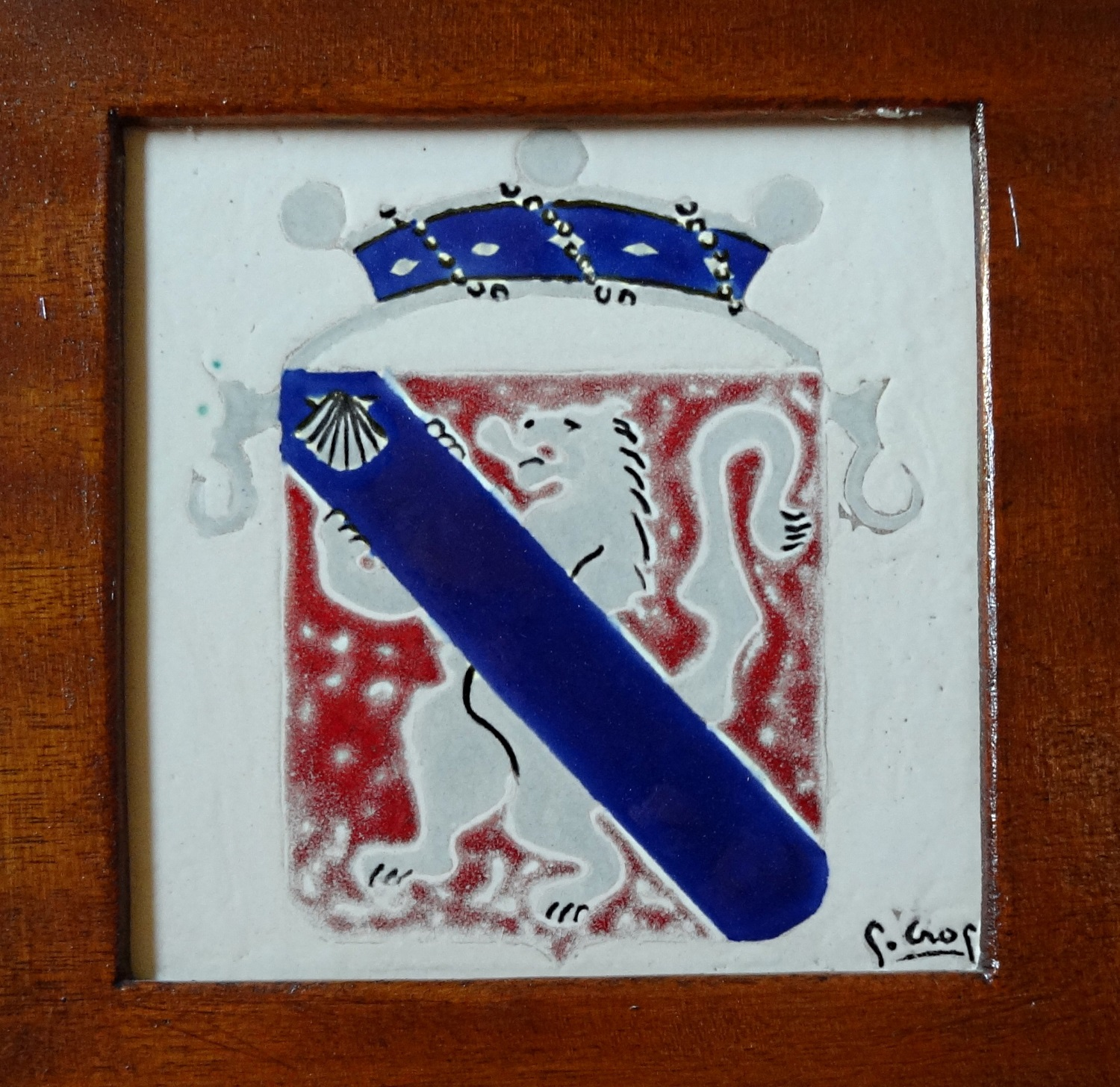 Blason de la famille des Menthon-La Balme portant la couronne de baron de Gruffy (Haute-Savoie, France). Plaque émaillée, collection personnelle.